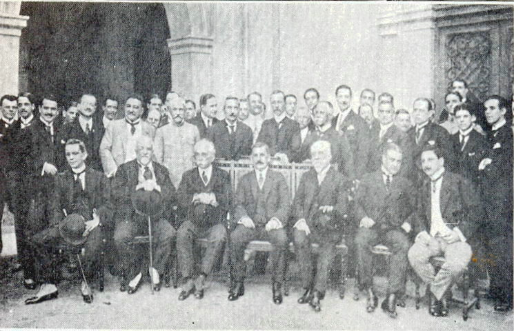 O nono presidente do Brasil, Venceslau Brás, e seu ministério: marechal José Caetano de Faria (Guerra), Augusto Tavares de Lima (Viação), Lauro Müller (Relações Exteriores) e almirante Alexandrino de Faria Alencar (Marinha). À sua volta, senadores, deputados e jornalistas.